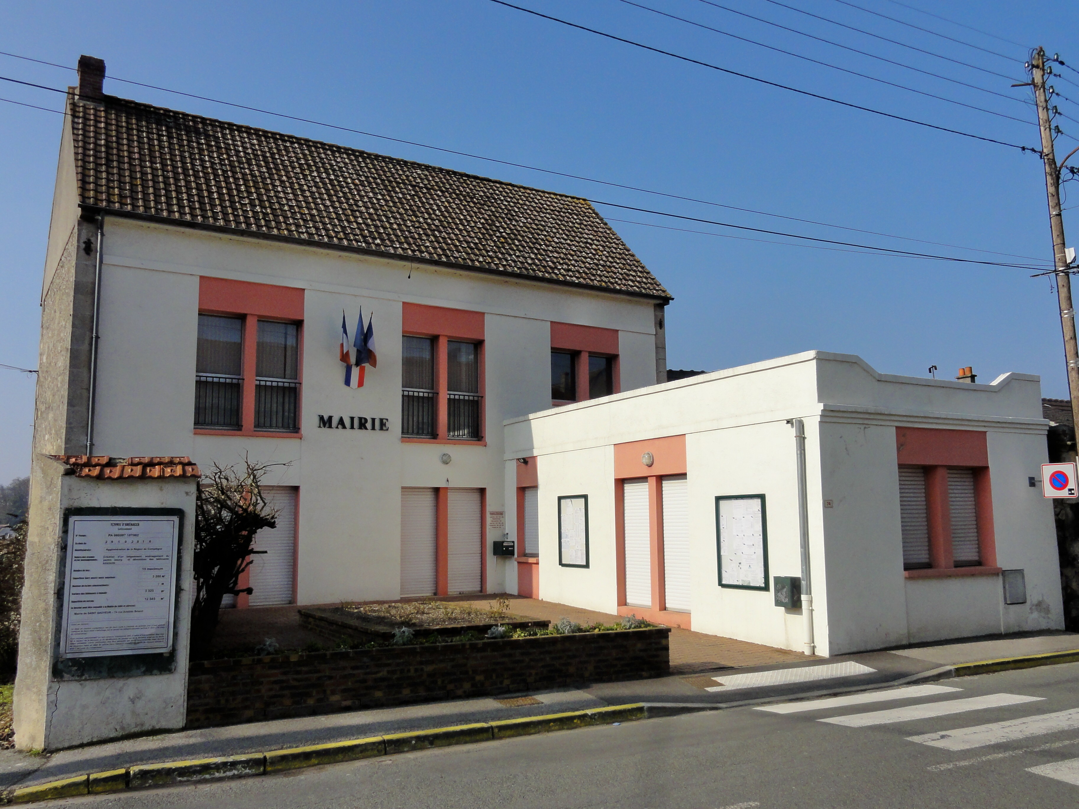 La mairie, rue Aristide-Briand.